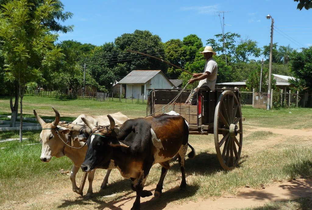 Carreta